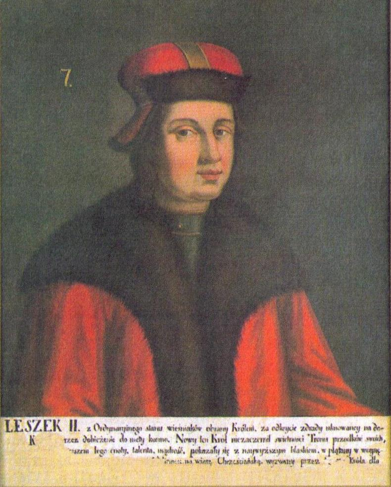 Leszek II